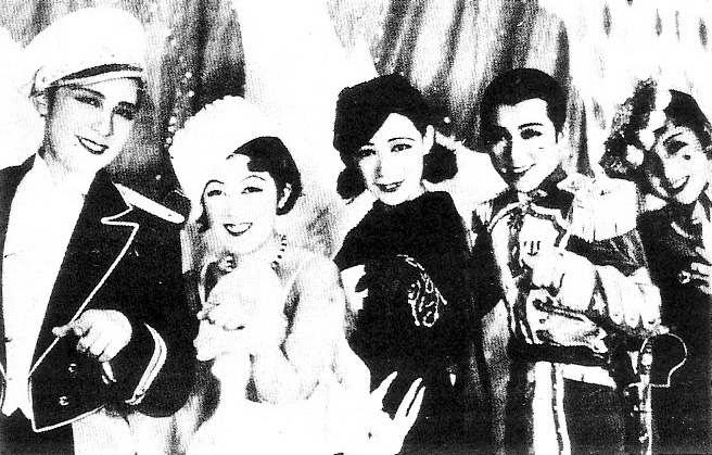 「ローゼン・カヴァリア」より。 左から、水之江瀧子、熱海芳枝、小倉みね子、オリエ津阪、江戸川蘭子